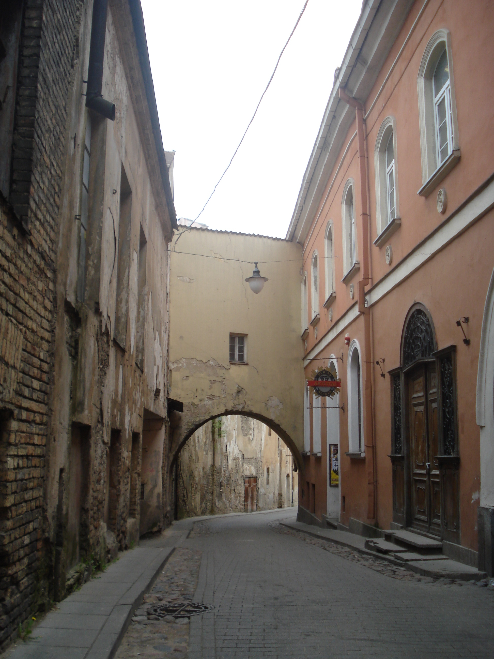 Švento Kazimiero gatvė (St Casimir street) in Vilnius